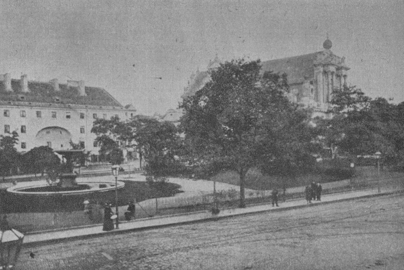 Skwer przy Krakowskim Przedmieściu przed budową pomnika Adama Mickiewicza ok. 1890. Widoczna fontanna znajdująca się obecnie przed kinem Muranów